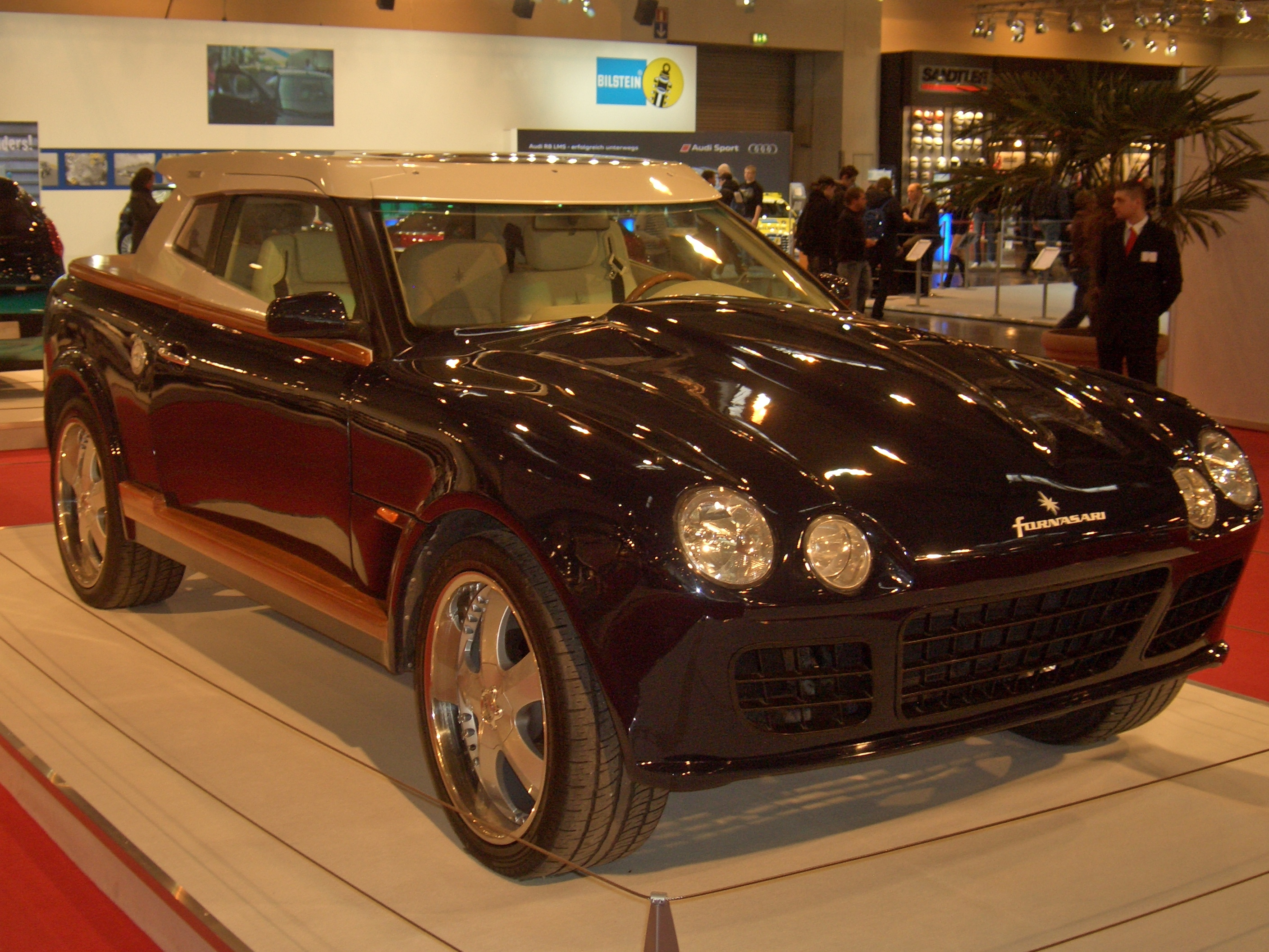 Fornasari Tender, 2010, seen at MOTOR SHOW ESSEN 2010